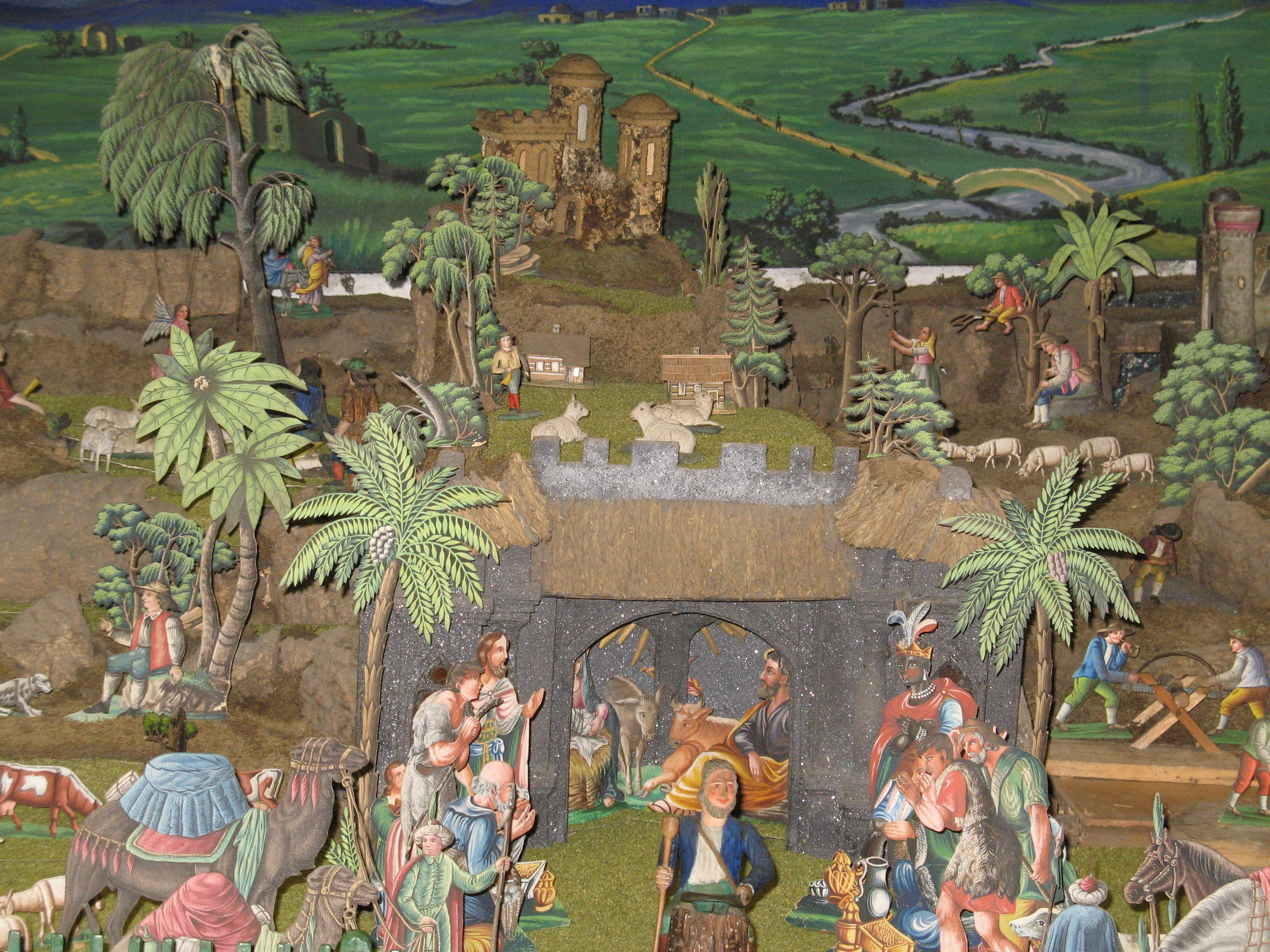 Weihnachtskrippe Betlem